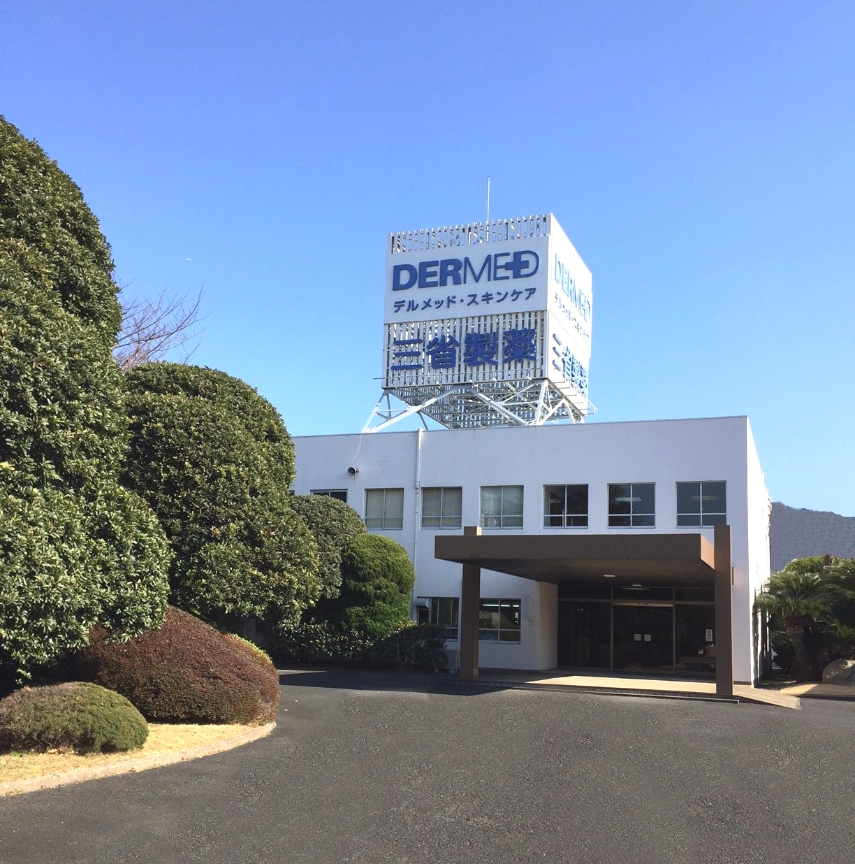 三省製薬株式会社 本社（福岡県大野城市）